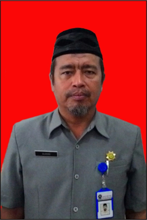 foto kepala sekolah Bp. Sukidi (2015-2020)